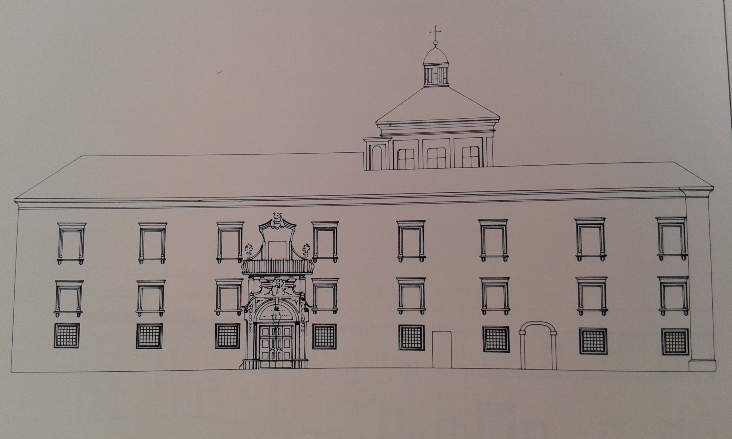 Il Palazzo Aliprandi di Penne (Pescara)